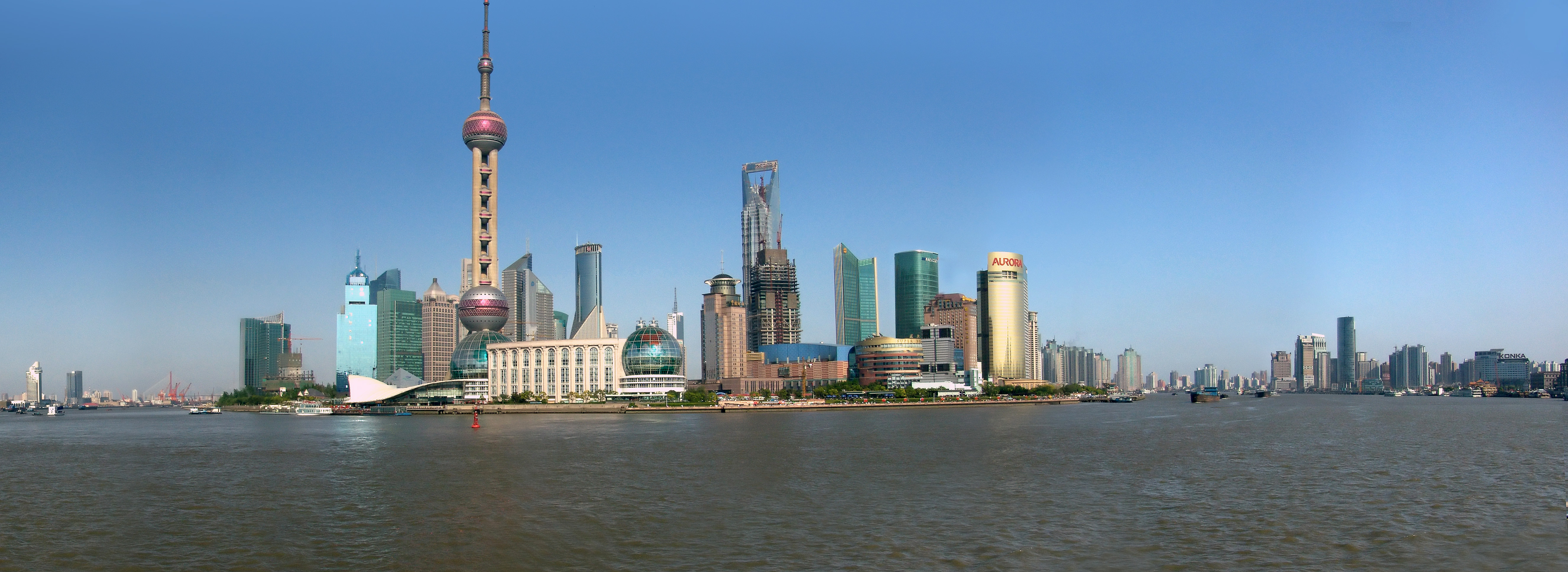 Вид на район Пудун с реки Хуанпу